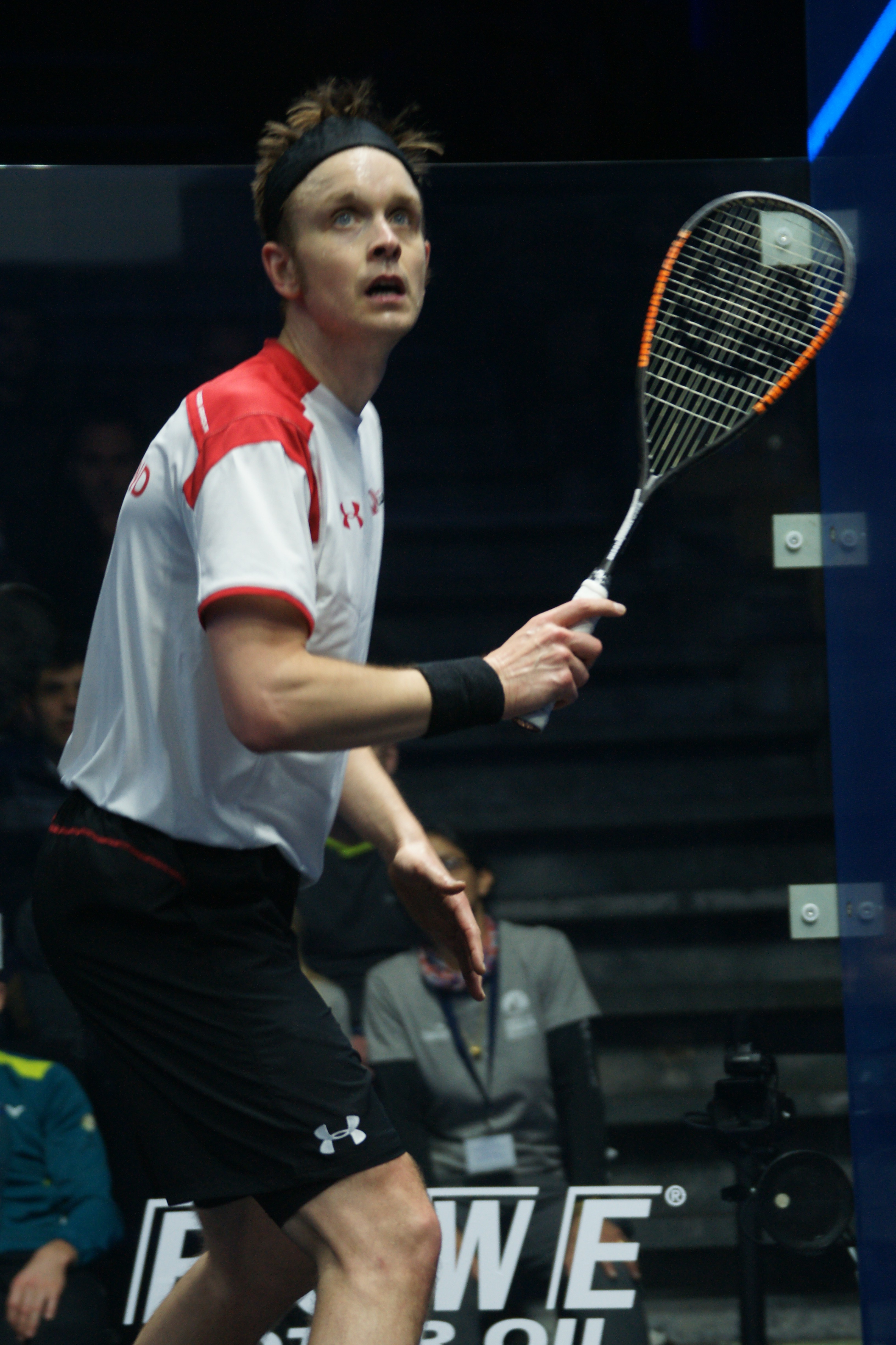 championnats du monde de squash par équipe Marseille 2017